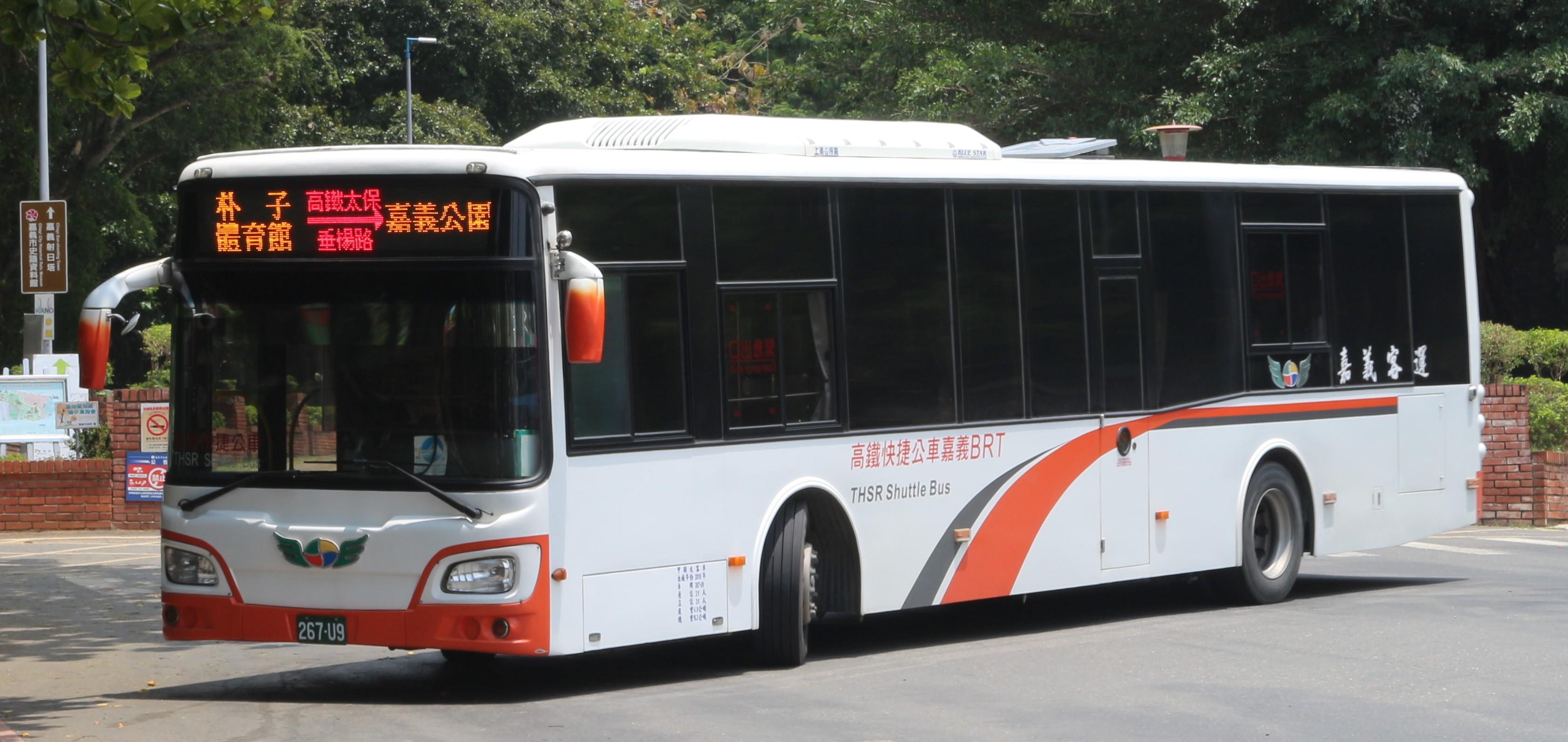 嘉義客運2018 HINO HS8JRVL-UTF 267-U9